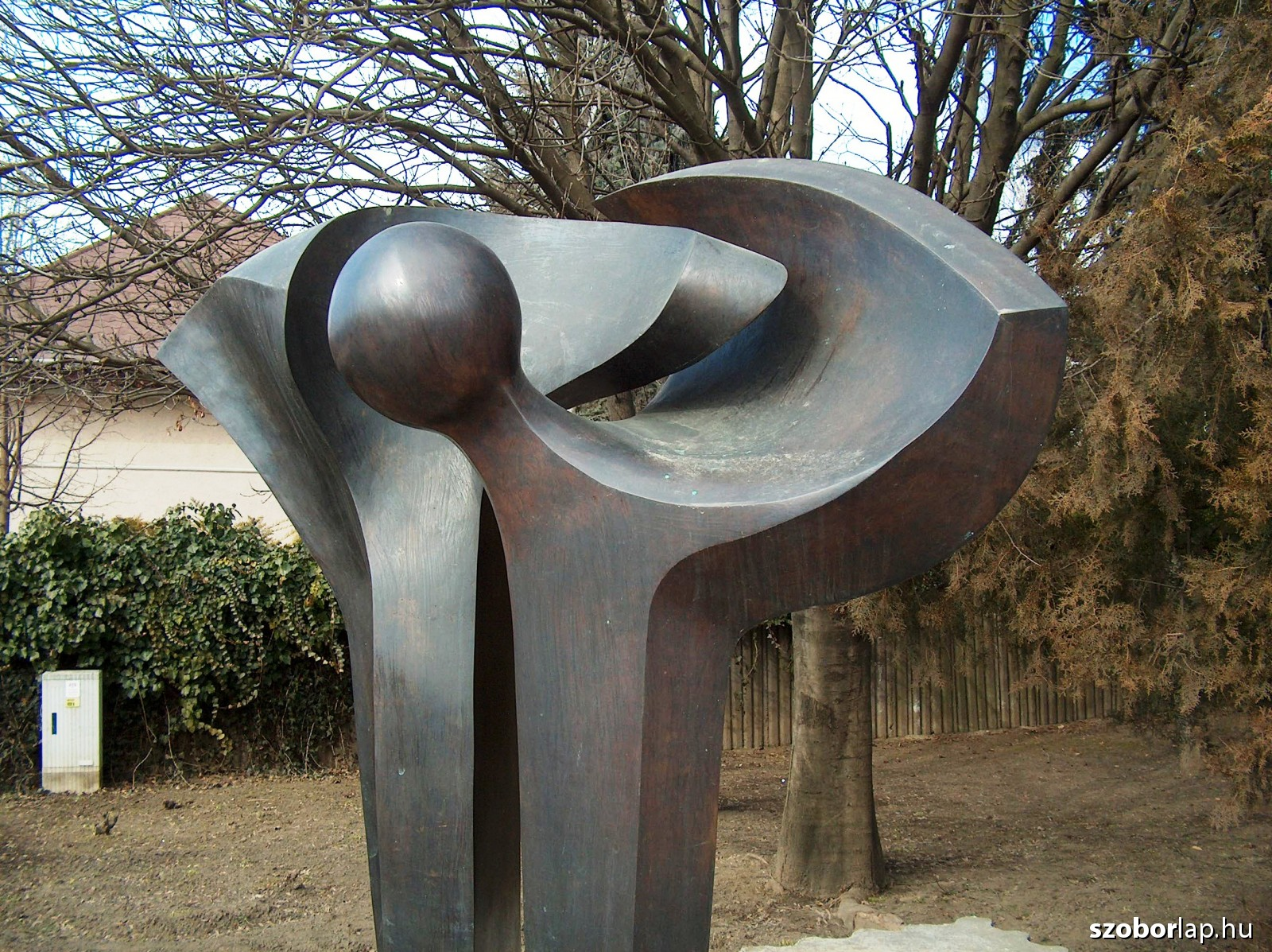 Eőry Emil Városvédő angyal (részlet) 1993.. - Érd, Alsó utca 9. (A Szepes Gyula Művelődési Központ előtt, a parkban).